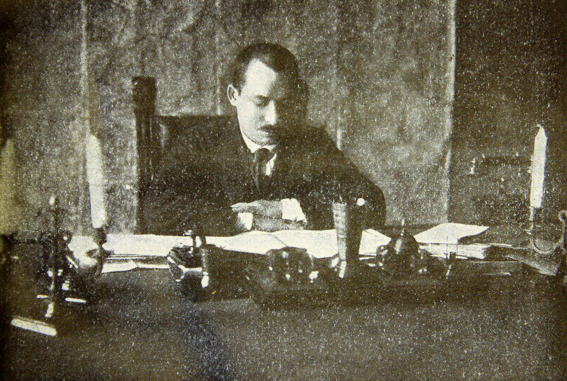 Аляксандр Чарвякоў, 1924.